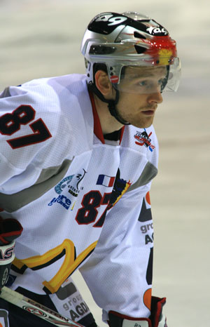 Teddy Trabichet, lors du match des champions à Grenoble (perdu par Rouen contre Grenoble 1-3)